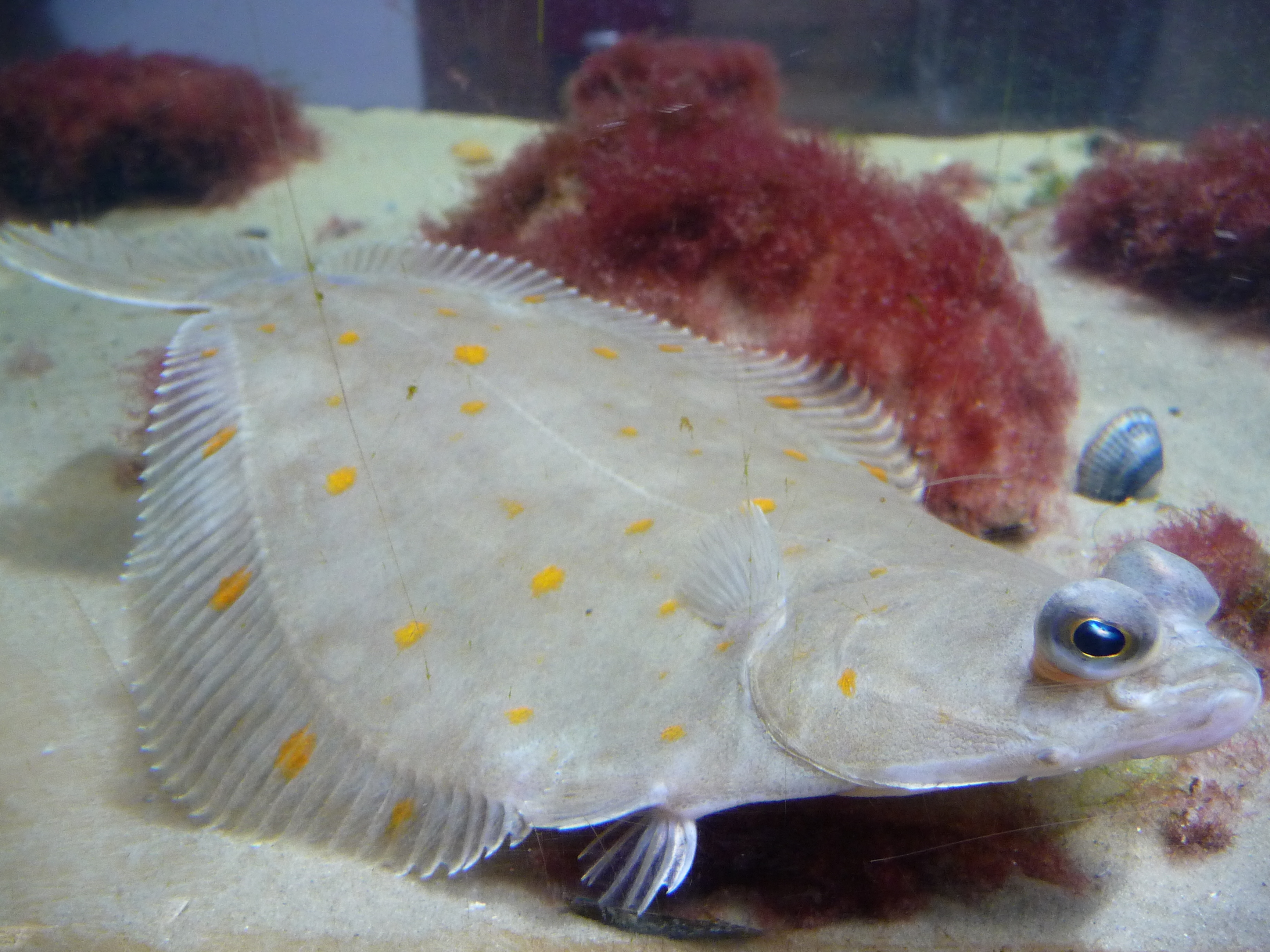 Scholle oder Goldbutt (Pleuronectes platessa)